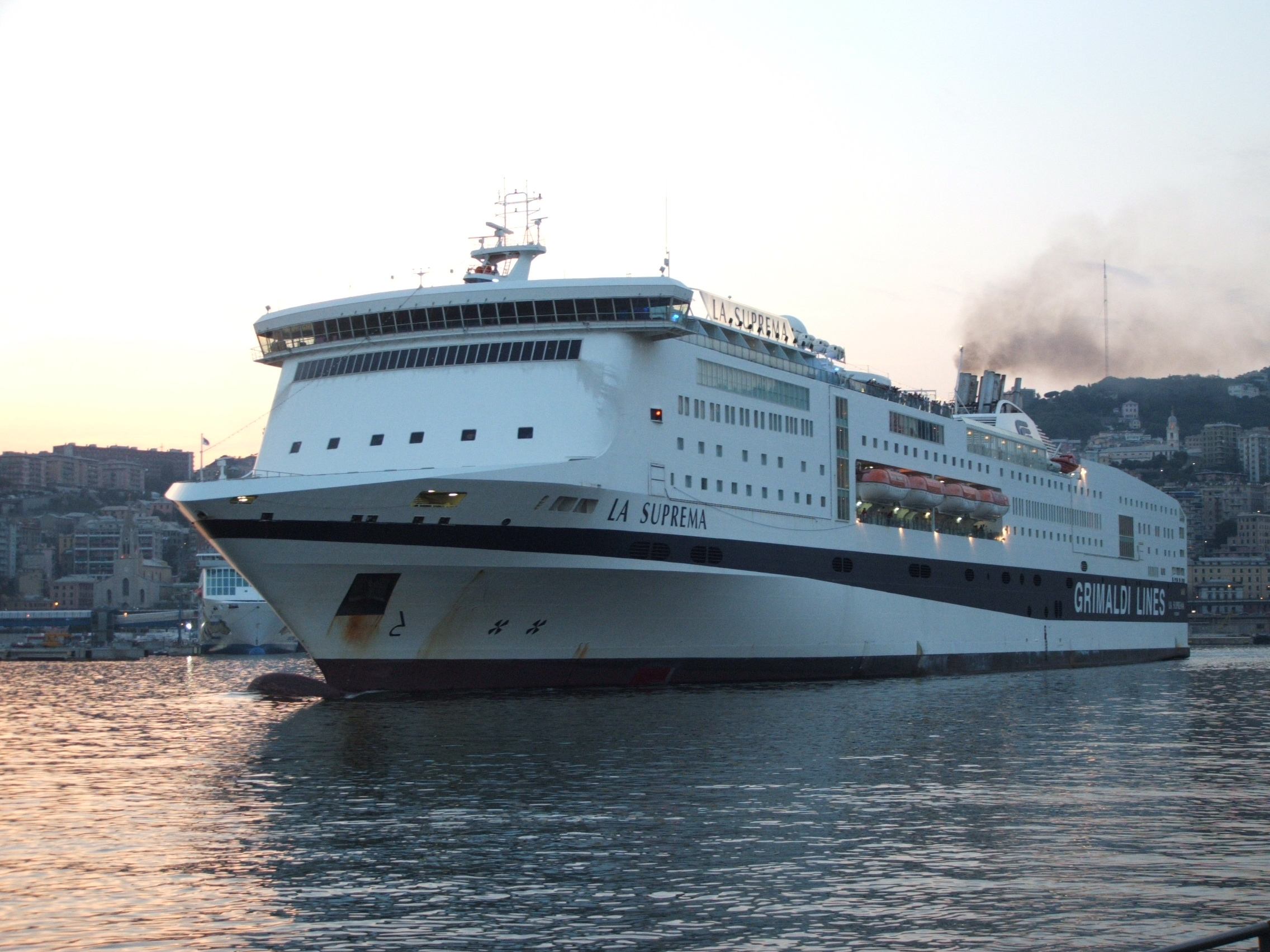 Porto antico di Genova Una moderna motonave in partenza dal porto di Genova